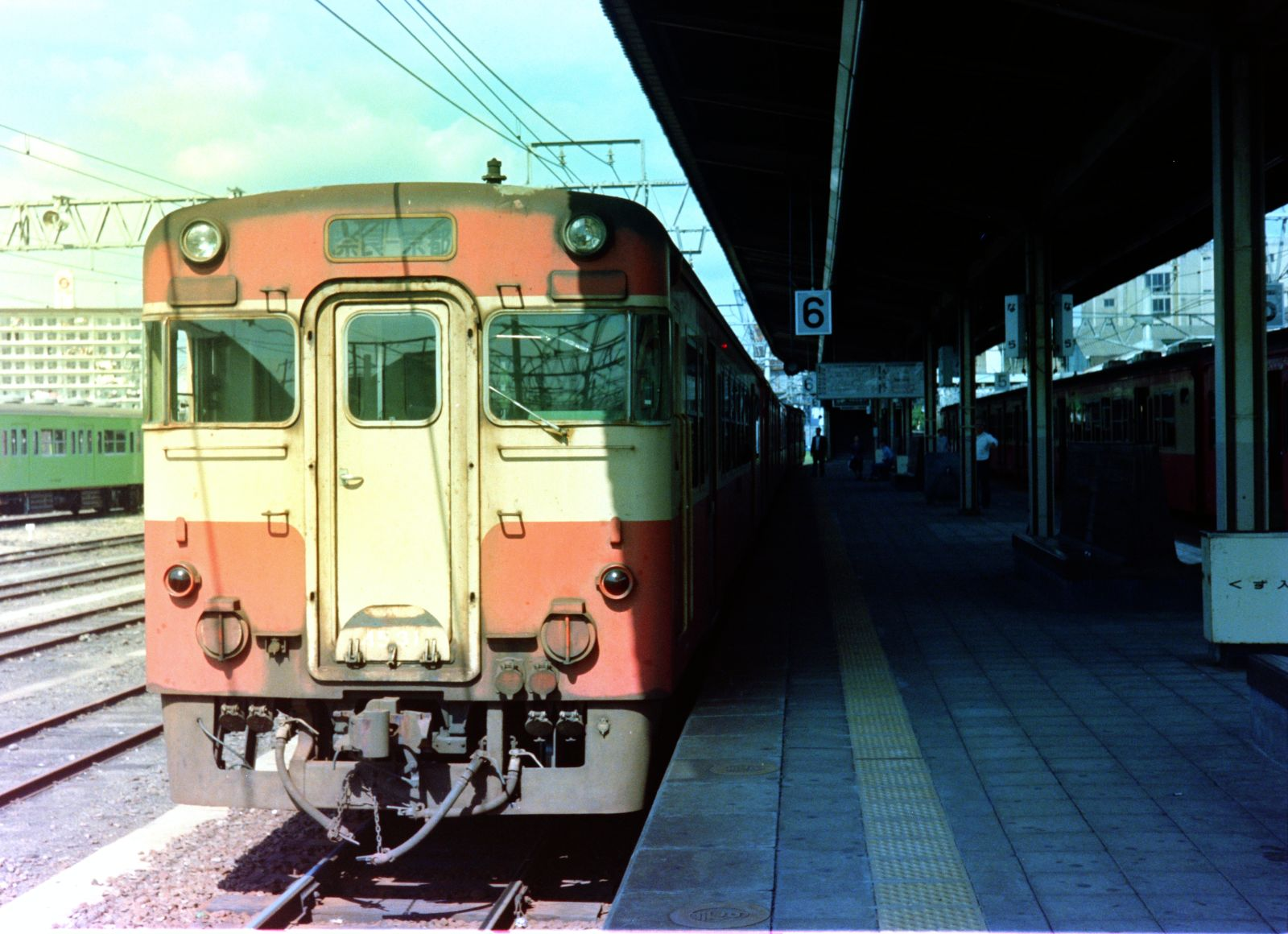 国鉄奈良駅で発車を待つ、奈良線京都行キハ45他4連。